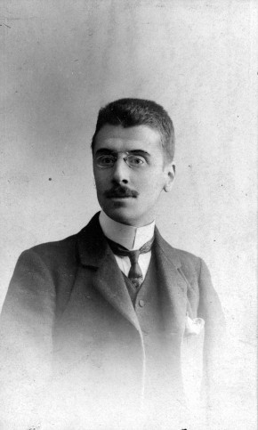 Julián Juderías (1877-1918).